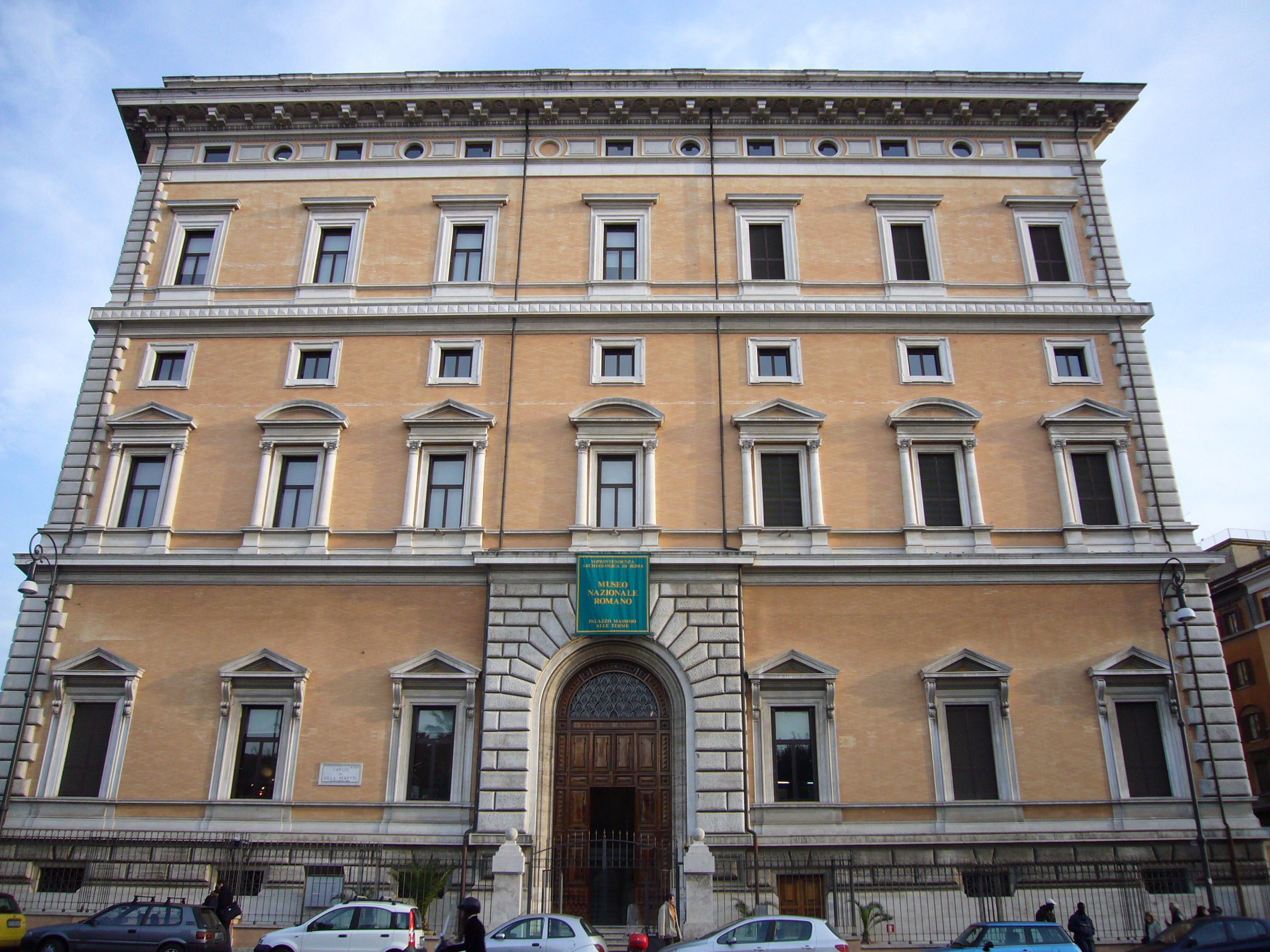 Roma, sede del Museo Nazionale Romano a Palazzo Massimo